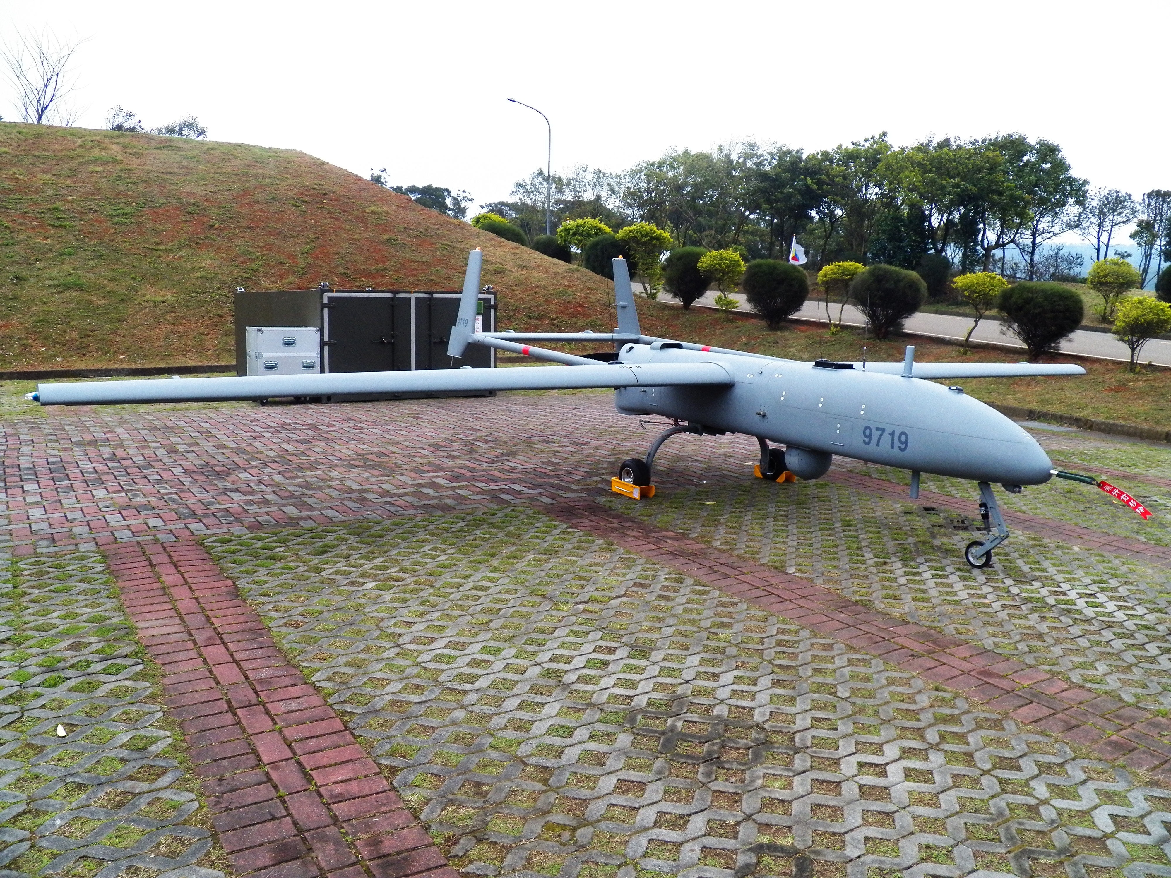 2013年裝甲兵學校營區開放活動，操場西端展示之銳鳶無人機9719。